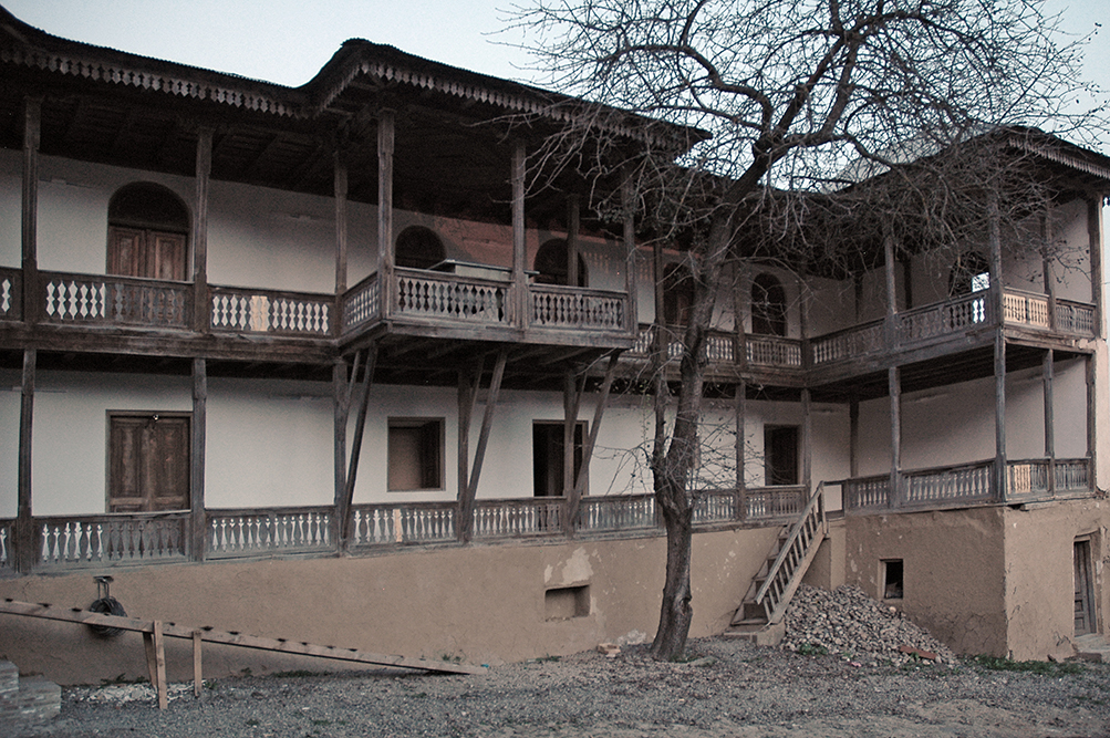 محله قدیمی آلاشت